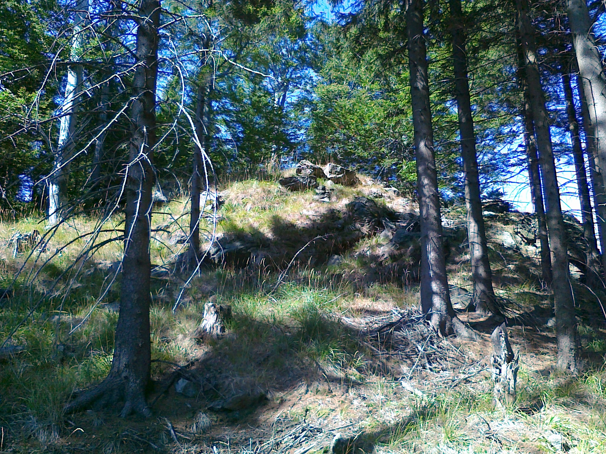 Widok na czepiec szczytowy góry Čepel - 1024 m n.p.m.